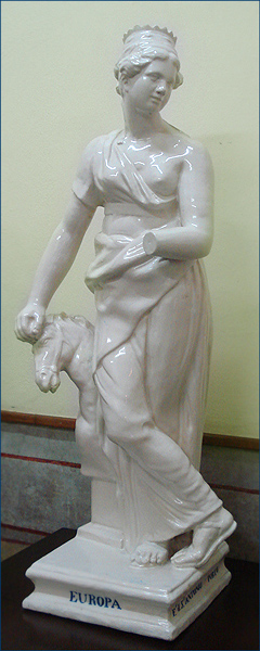 Estatuária de origem portuguesa antigamente na fachada, hoje preservada no interior do Solar dos Câmara, Porto Alegre, Brasil.